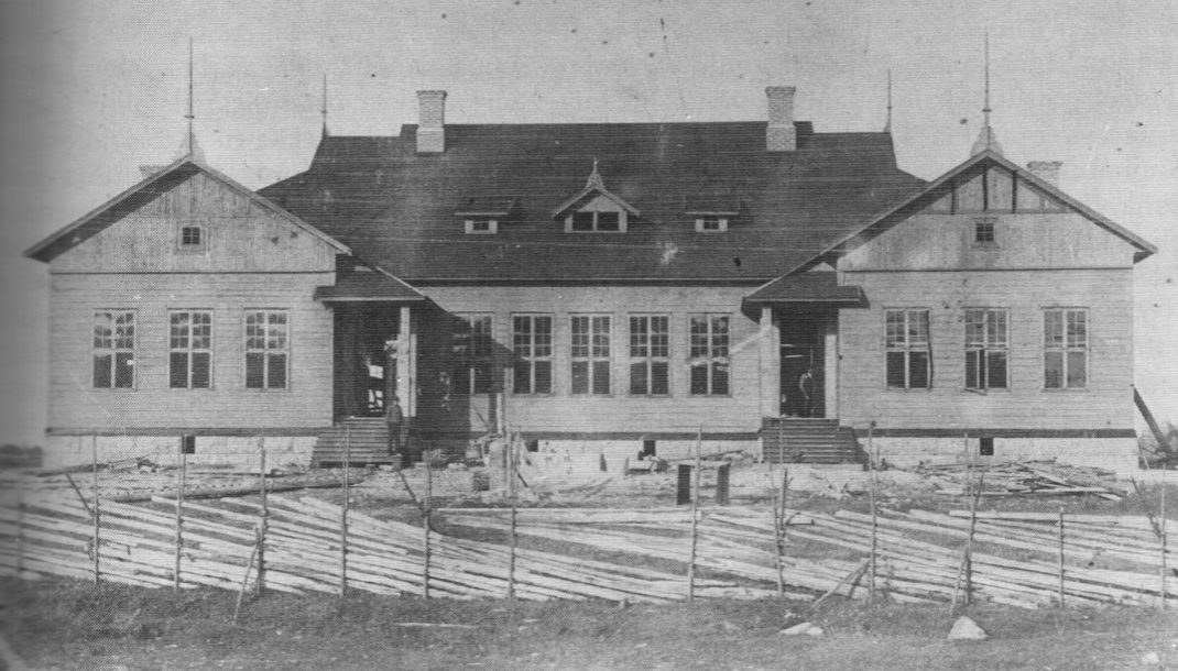 Viitasaaren Yhteiskoulu vuonna 1908. Koulurakennus on valmistunut 1908 ja sen on suunnitellut Väinö Keinänen.